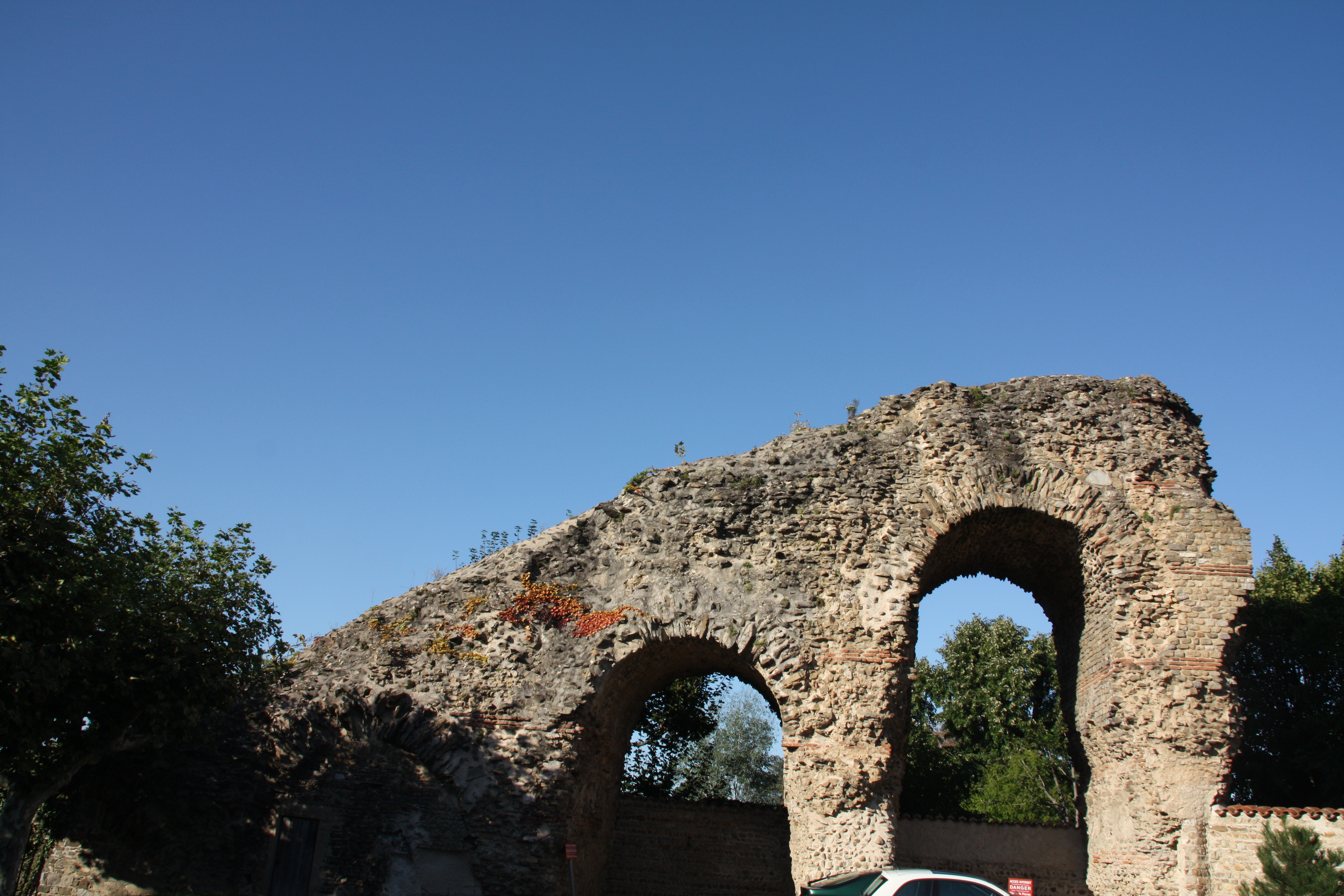 Rampant et réservoir de fuite du siphon des Massues de l'Aqueduc de la Brévenne à Tassin-la-Demi-Lune This building is en partie classé, en partie inscrit au titre des Monuments Historiques. .